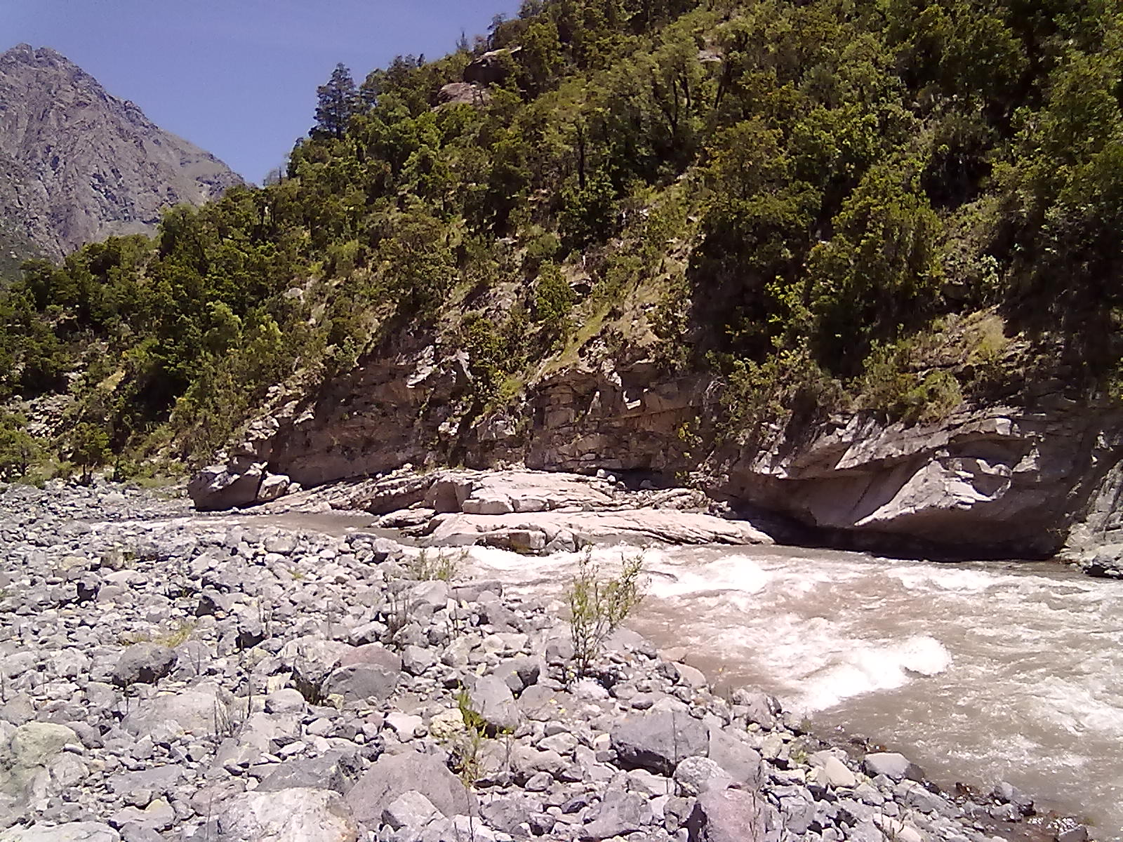 Río Teno más arriba que Los Queñes, camino a las minas de la empresa Bío-Bío.